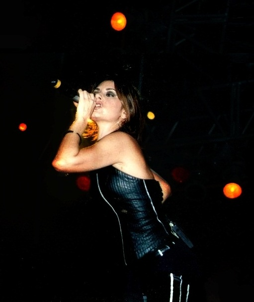 Cantora Fernanda Abreu durante a turnê Na Paz, em 2004. Foto: Alice Abreu: Assessoria de Imprensa Fernanda Abreu